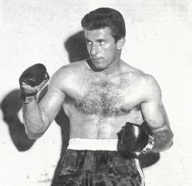 pugile italiano